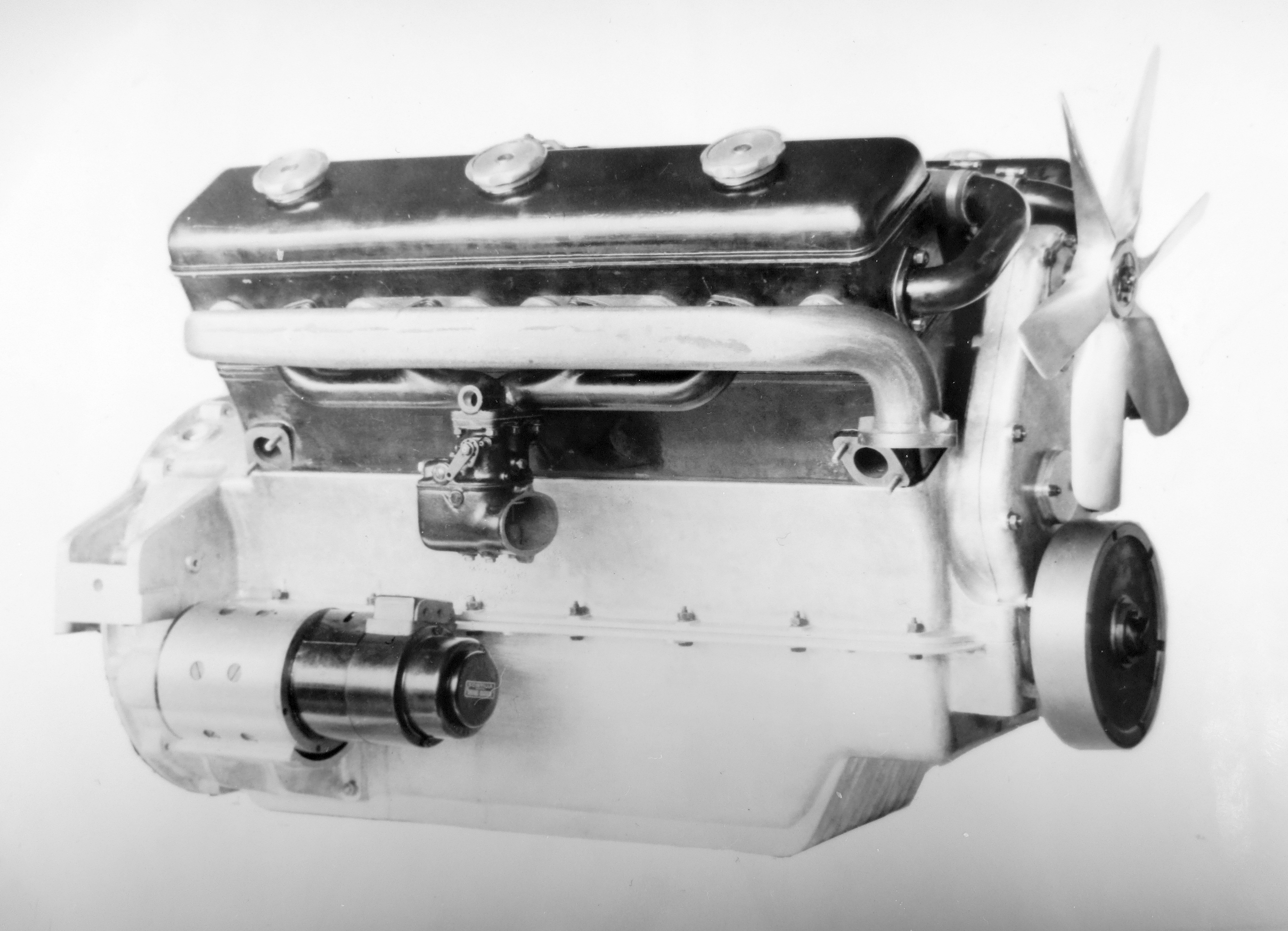 Walter D-Bus, motor autobusu (1932)